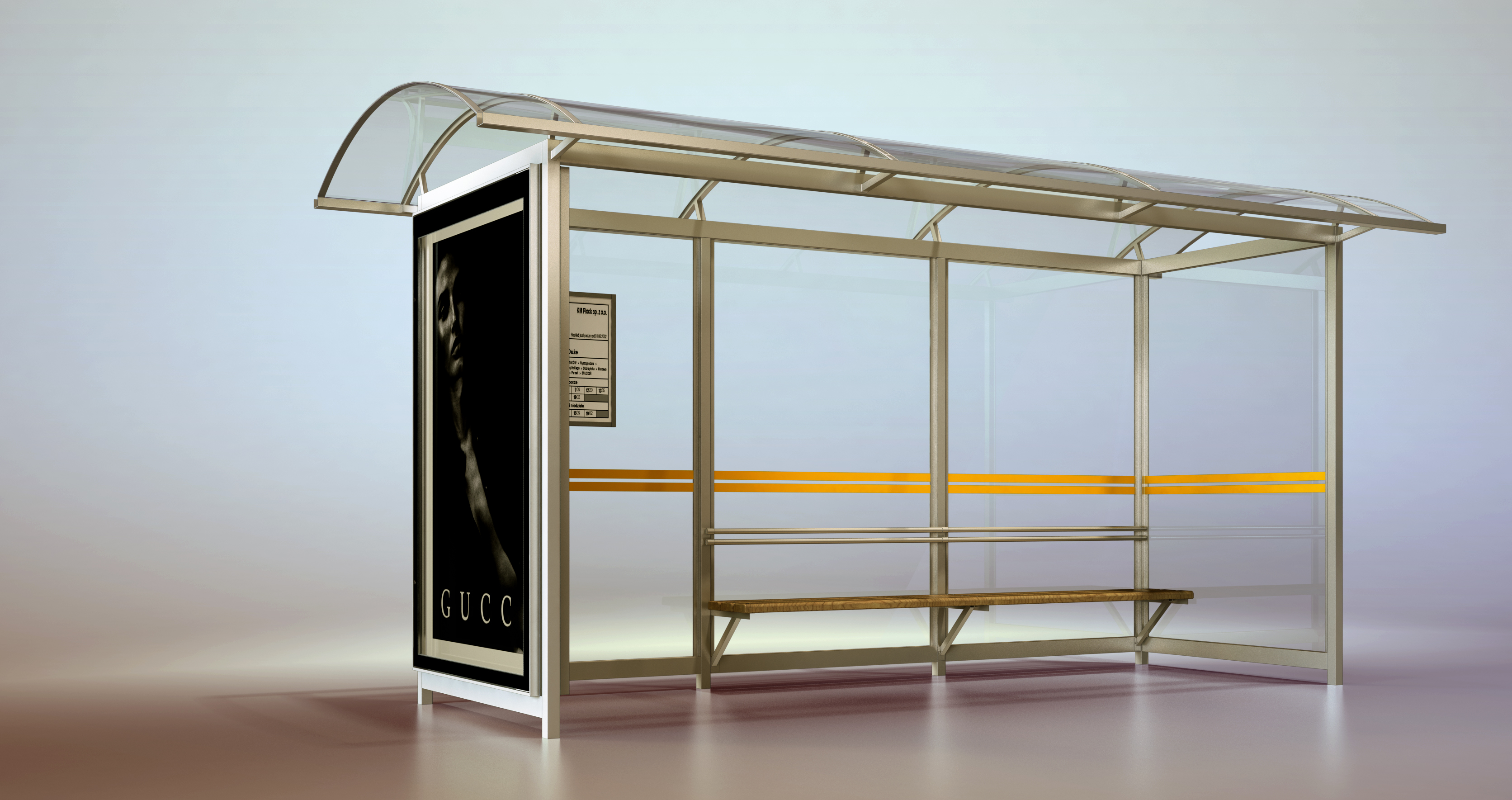 Wiata Merkury z Gablotą Reklamową Ławką i Ramką na Rozkład Jazdy